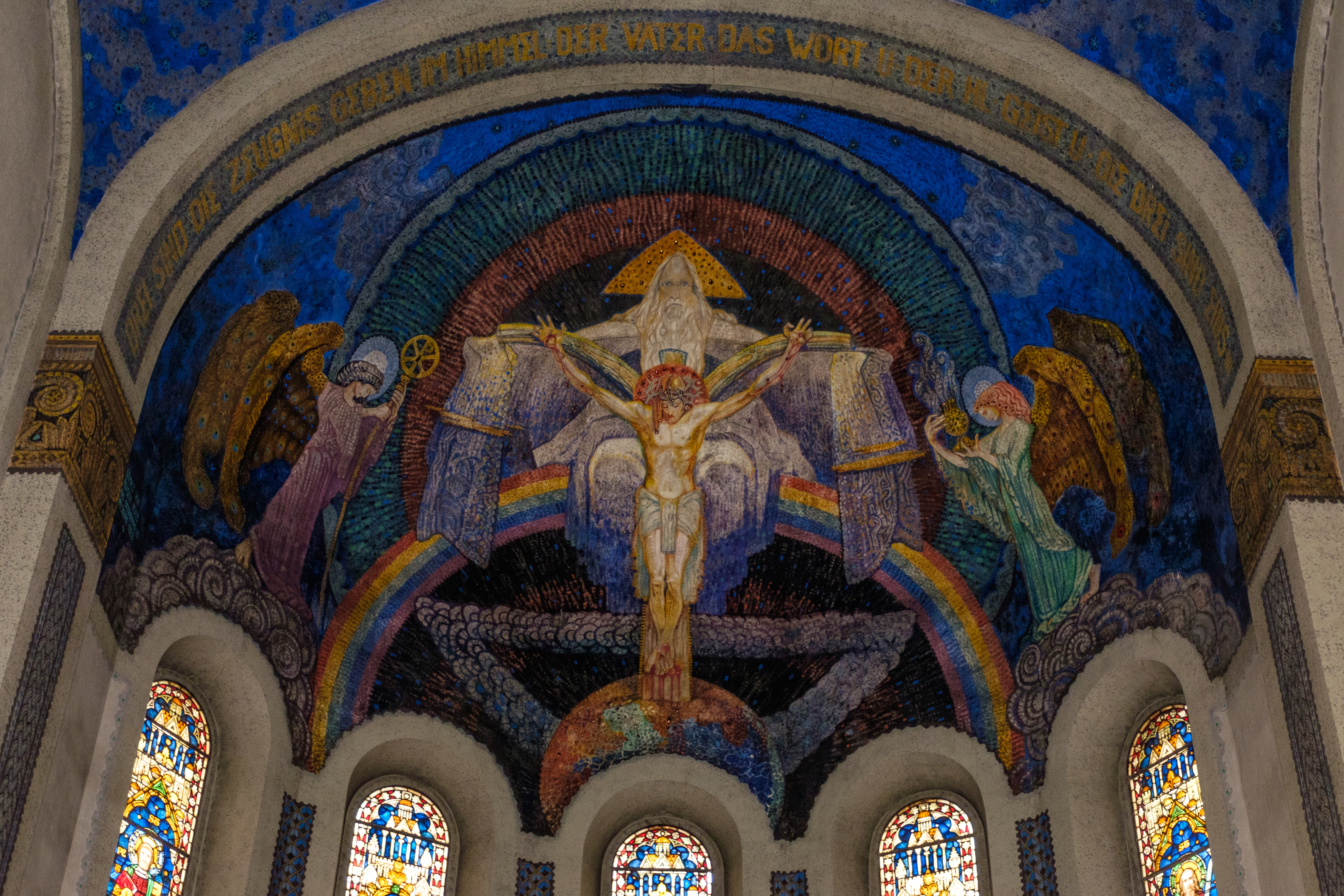 Pfarrkirche St. Johannes ("Taunusdom") in Kirdorf, Kuppel der Apsis mit Malereien von Augustin Kolb